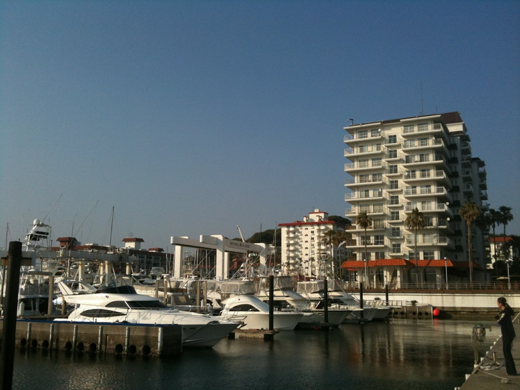 Zushi Marina, Zushi city, Kanagawa-ken Japan